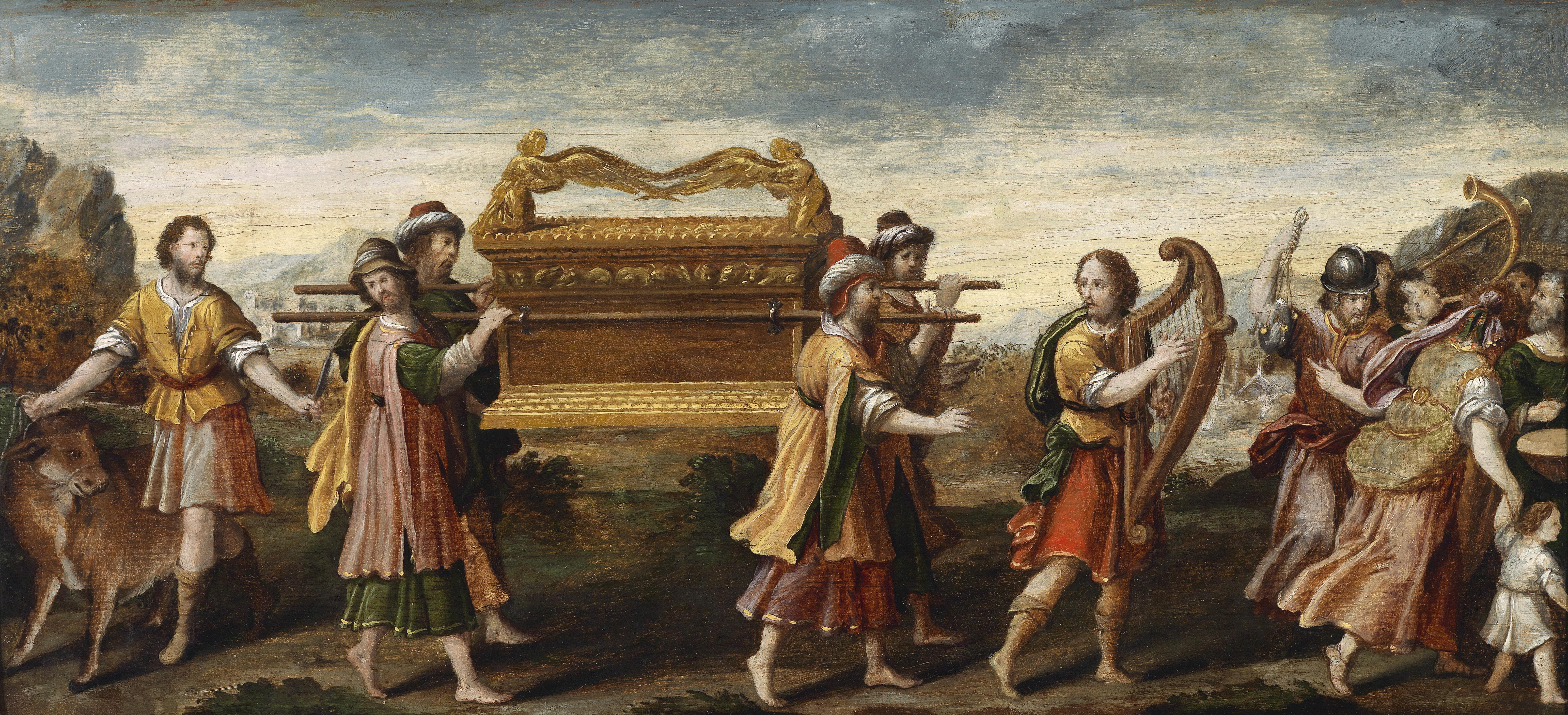 Die Überführung der Bundeslade durch den singenden und tanzenden David, Öl auf Holz, 37,6 x 82 cm